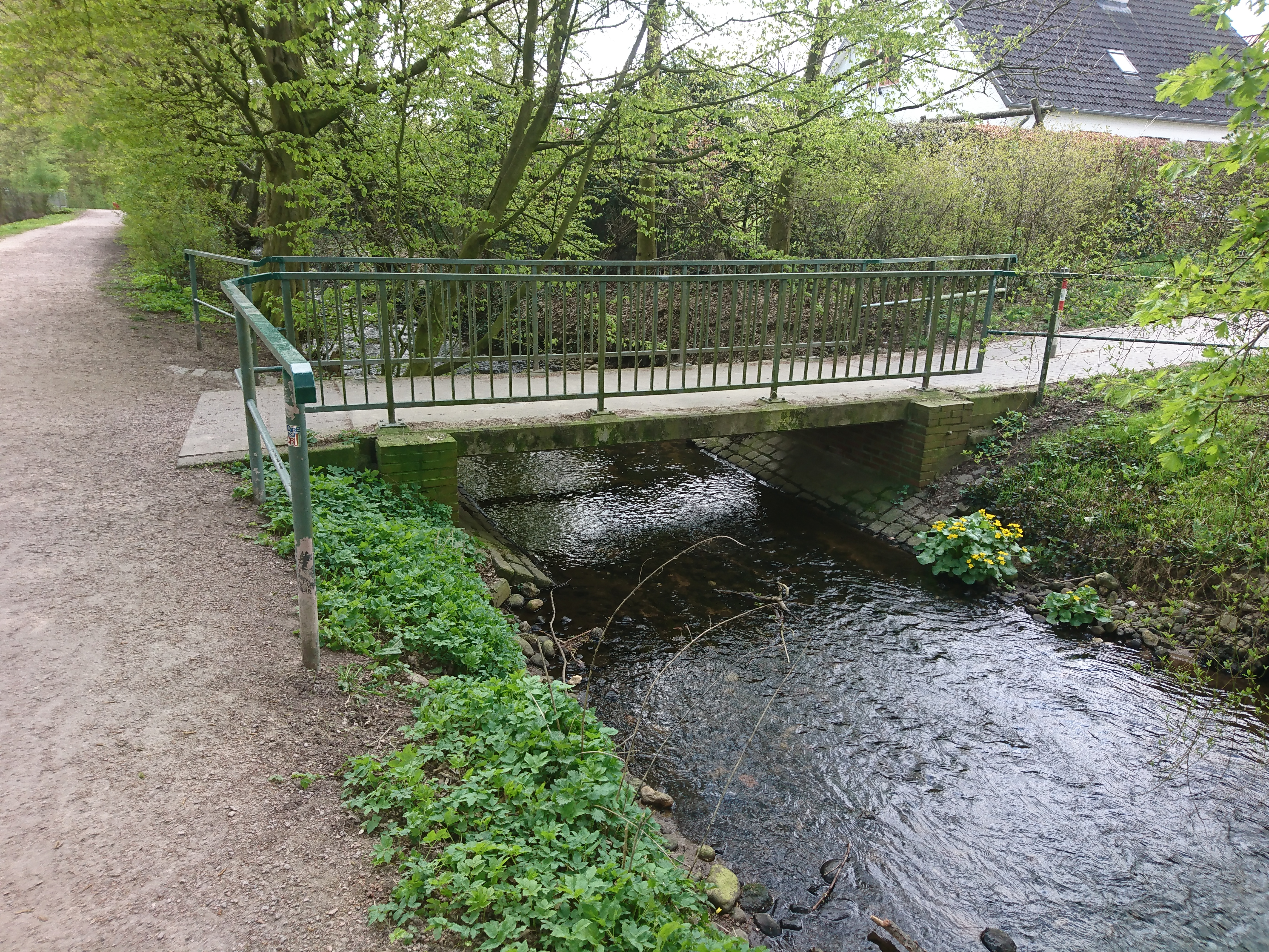 Fußgängerbrücke über die Tarpenbek. Links Hamburg-Langenhorn, rechts Norderstedt. Rehts geht es zur Tarpenbekstraße Ecke Bekwisch. Links führt ein Weg, der hier nicht zu sehen ist, zur Essener Straße. Parallel zur Tarpenweg verläuft ein weiterer Weg.